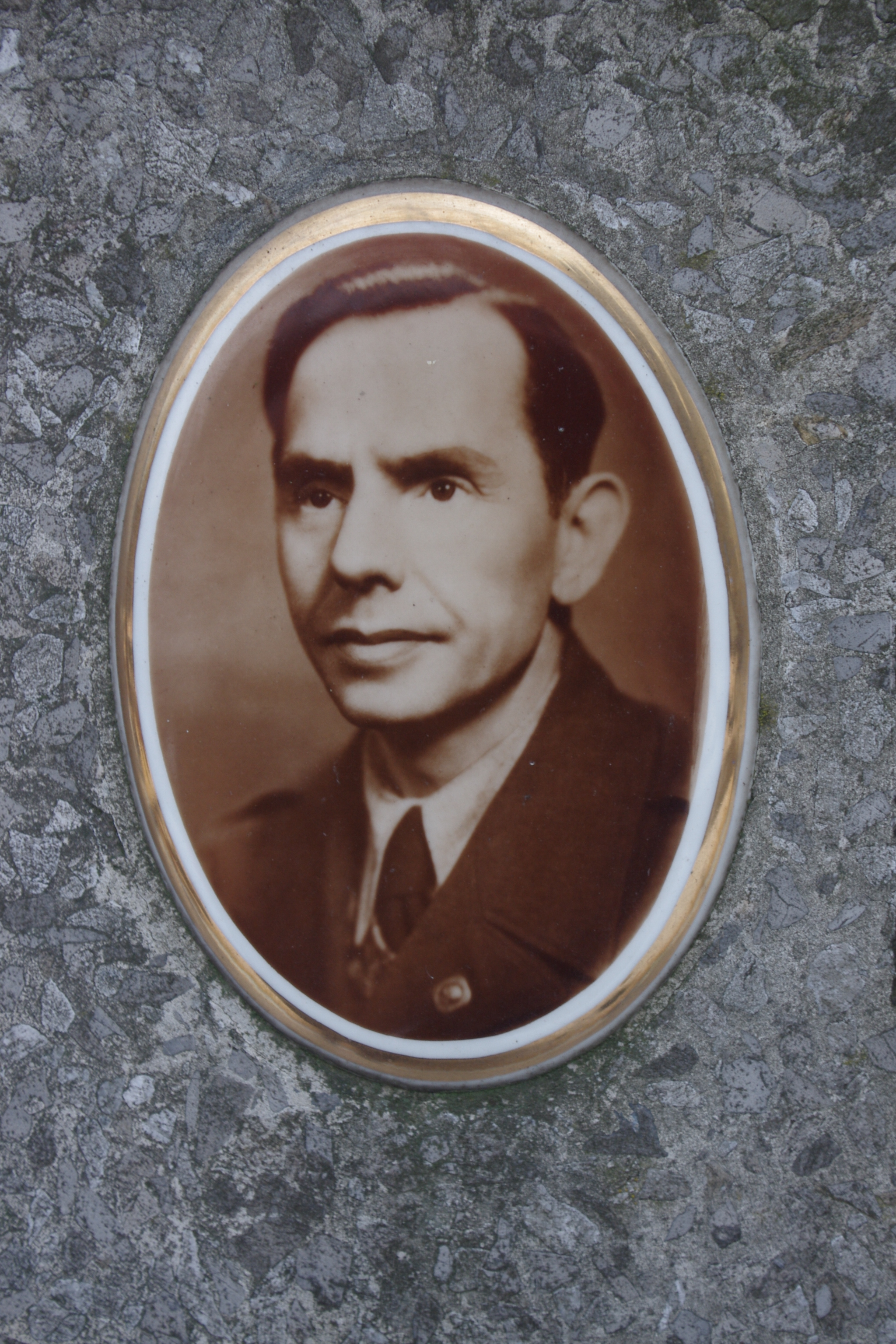 Grób polityka Hieronima Dobrowolskiego na Cmentarzu Bródnowskim w Warszawie